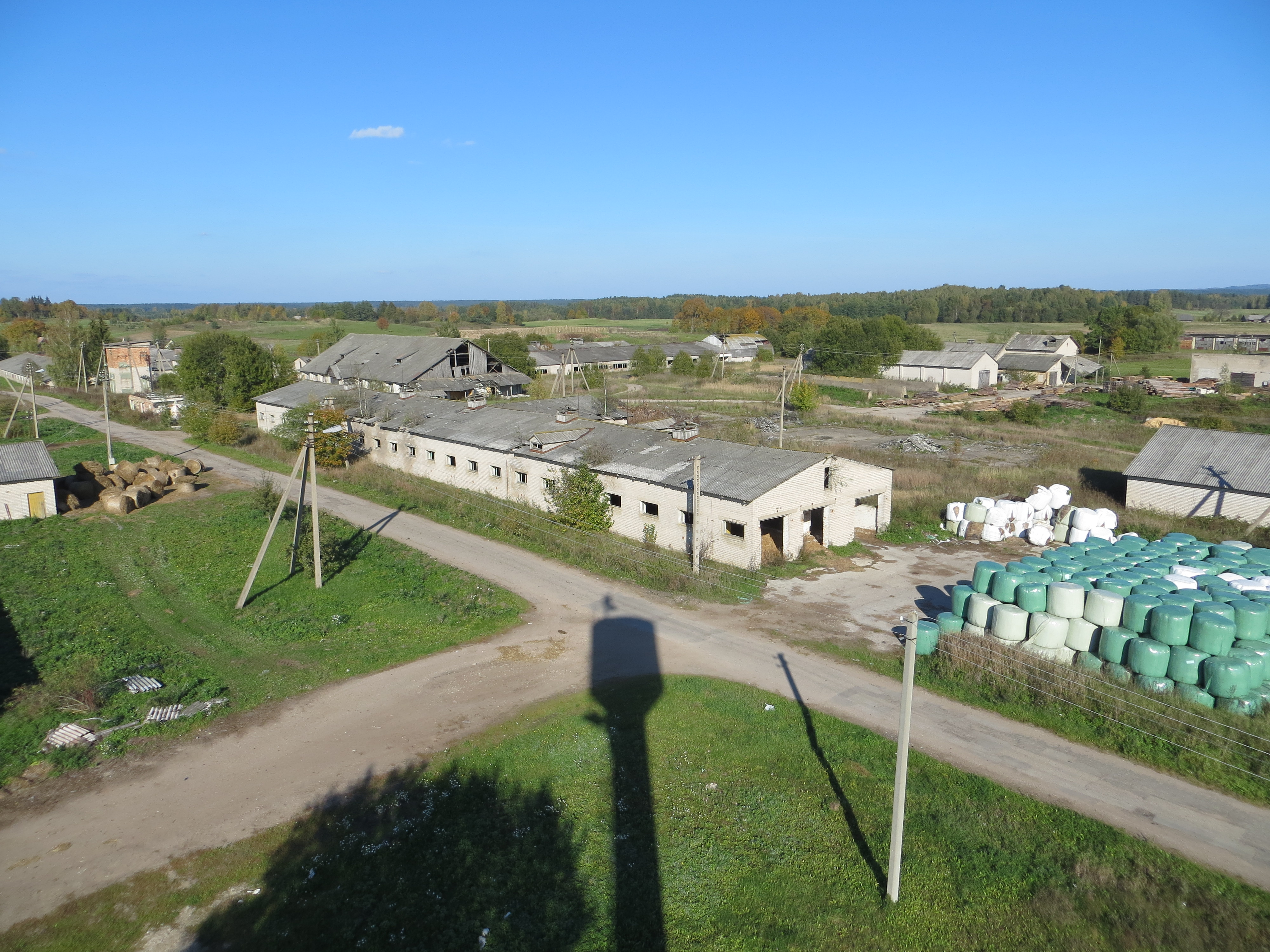 Grikiapelė, Lithuania